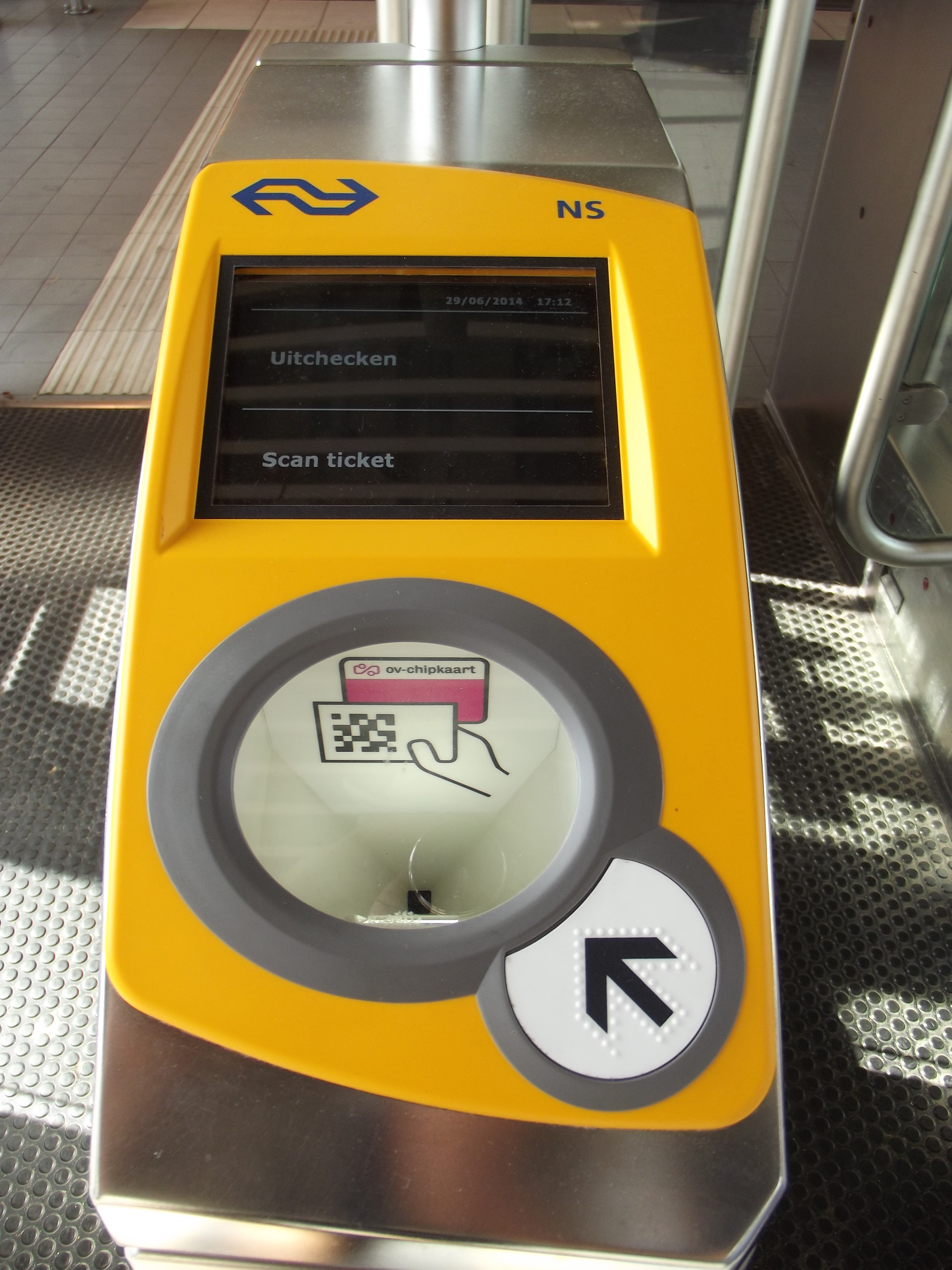 Combinatie barcodelezer en OV-chipkaartlezer bij de grote OV-Chipkaartpoort voor rolstoelen. De OV-chipkaart moet op het pijltje gelegd worden. De barcodelezer is afgeschermd met een glasplaat.